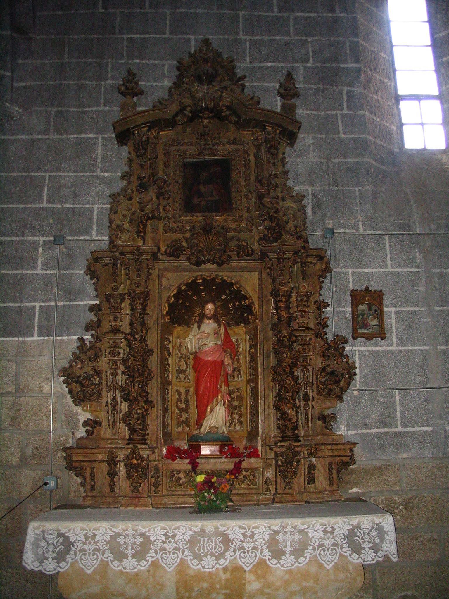 Retablo del Sagrado Corazón de Jesús, Iglesia Ntra Sra del Castillo, Macotera